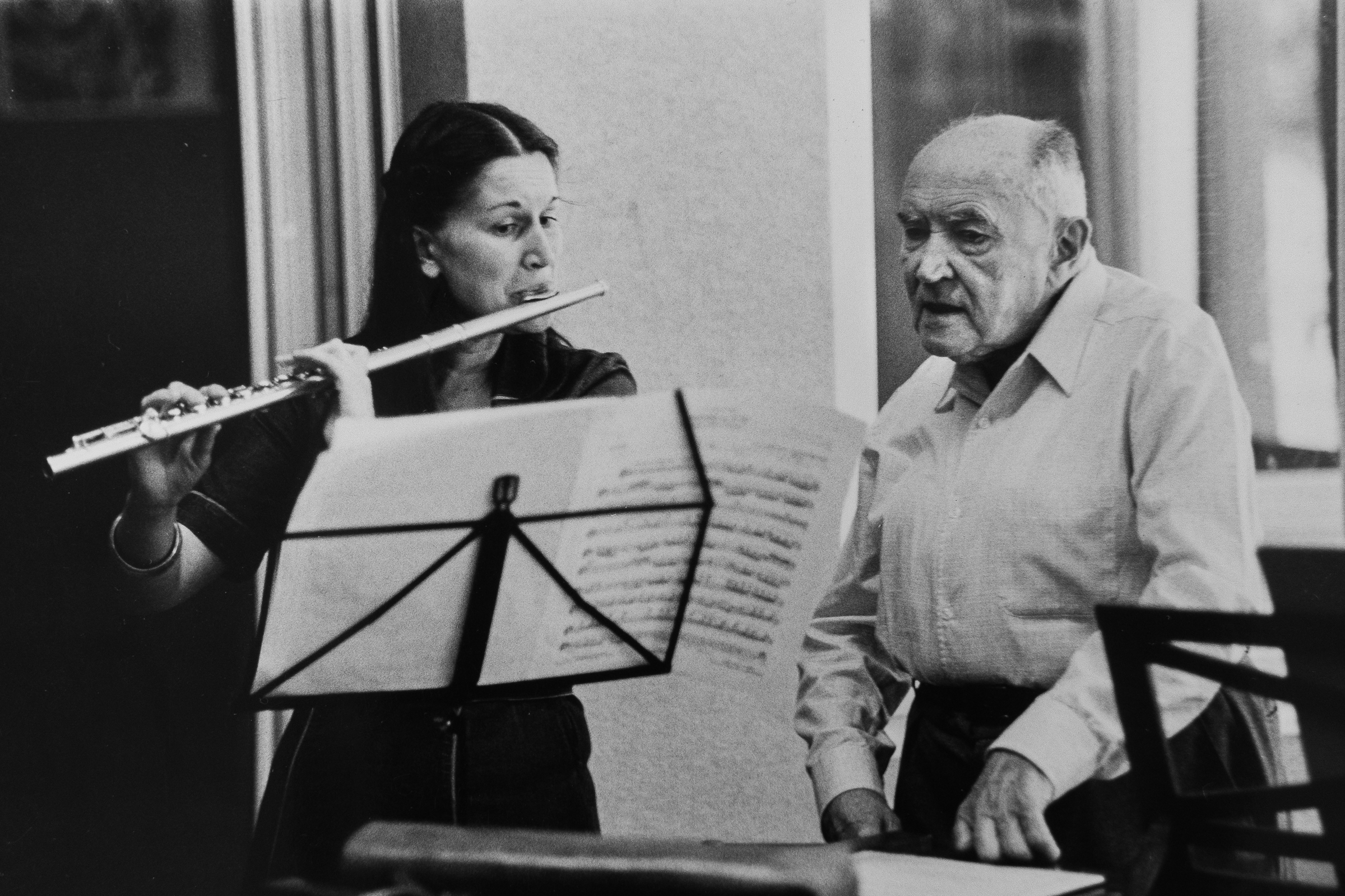 Le flûtiste français René Le Roy au cours d’une masterclass à Puget-Théniers en août 1981.